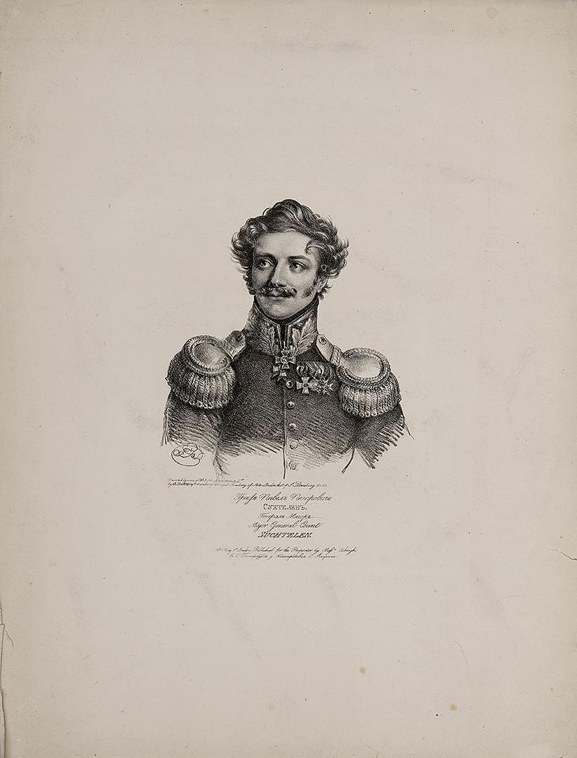 Портрет генерала П. П. Сухтелена